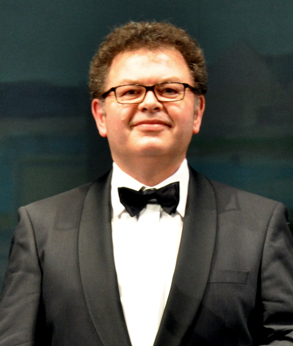 Franz Raml (beim Schlussapplaus seiner Aufführung von "Giulio Cesare" im Konzerthaus Ravensburg)